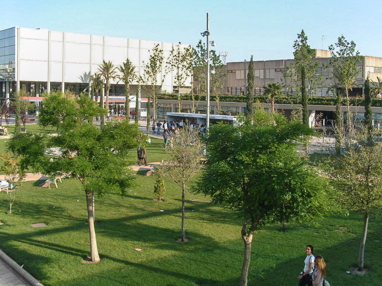 Àgora UPV 2